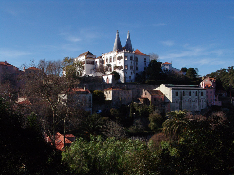 Palácio Nacional de Sintra